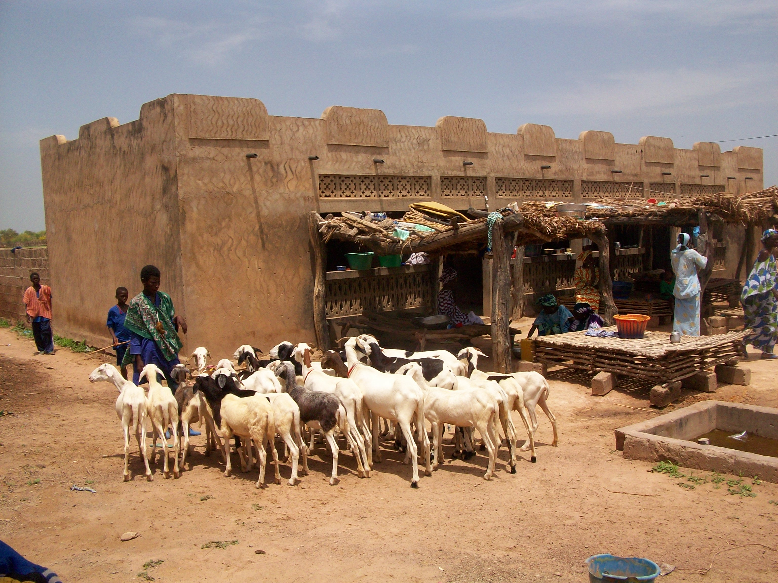 Une boutique du village de Doudé Bagué (Sénégal)